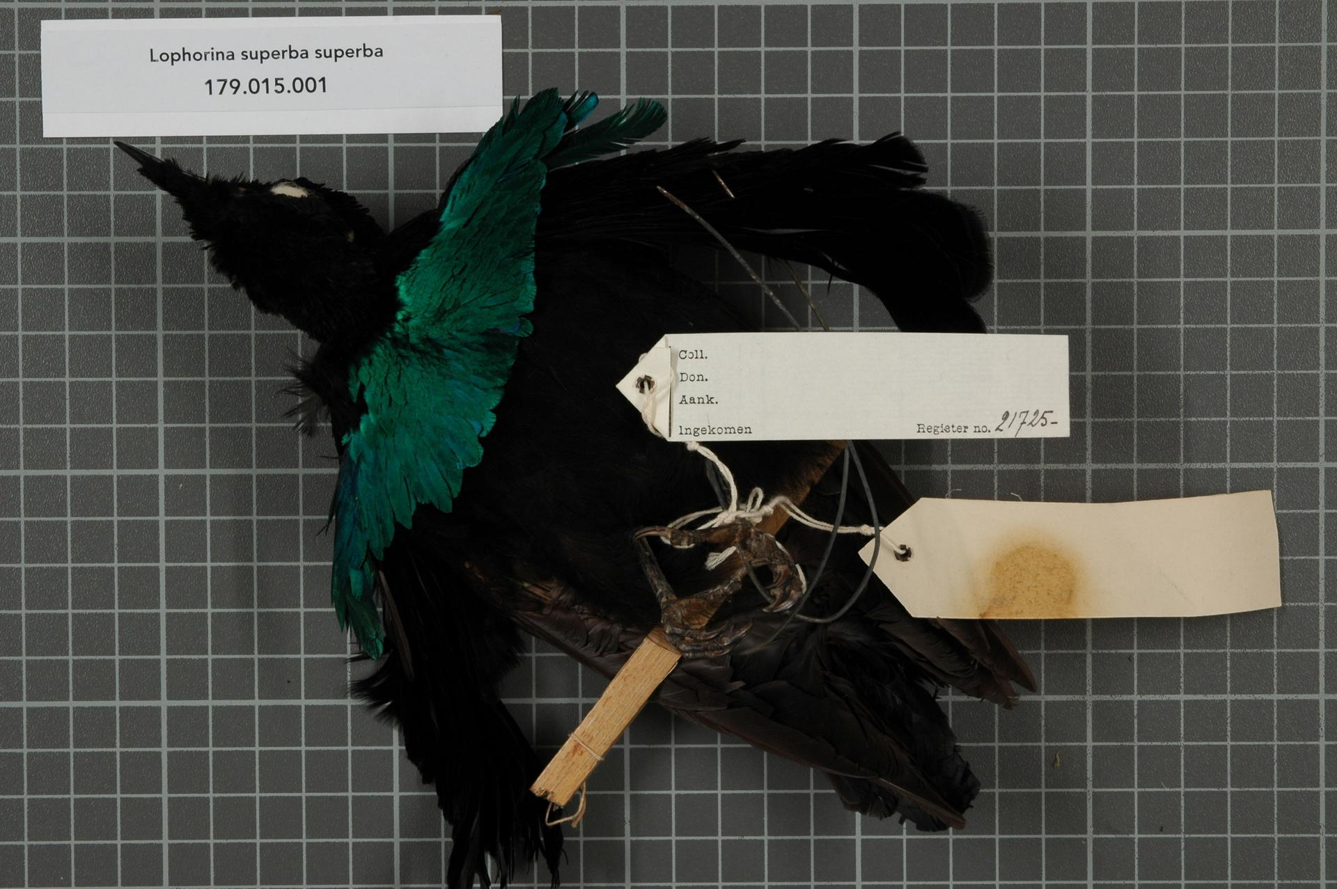 Lophorina superba superba (Pennant, 1781)